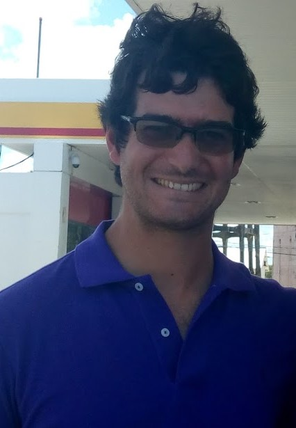 Juan Marcos Angelini en 2017.